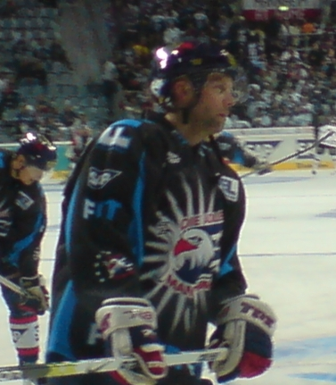 Daniel Johansson